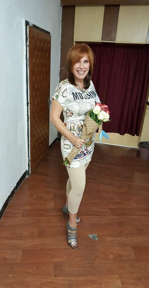 На снимката е Кичка Бодурова